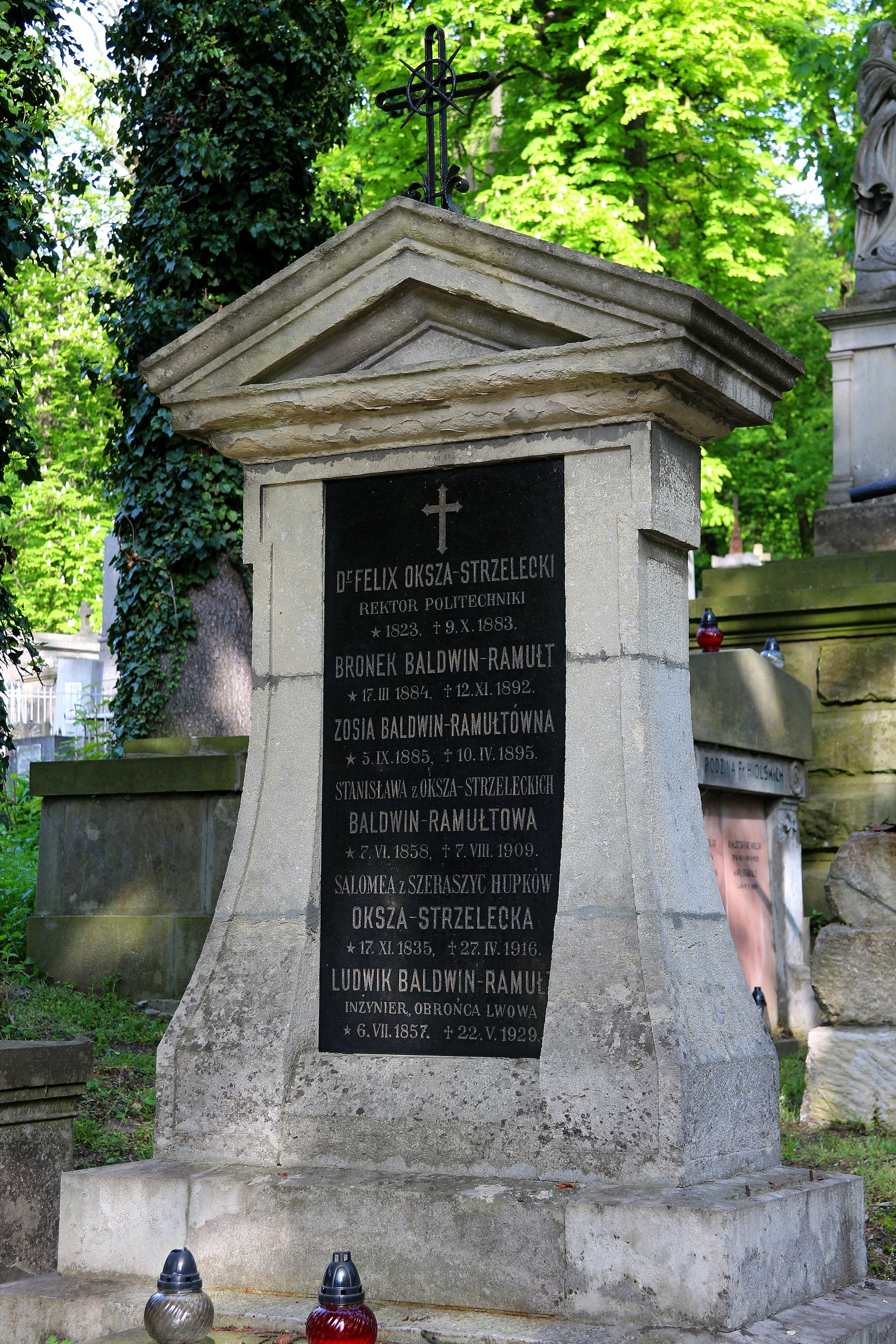 Гробниця родин Рамултів та Стшелецких. Личаківський цвинтар , поле № 14.